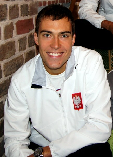 Jerzy Janowicz, polski tenisista.